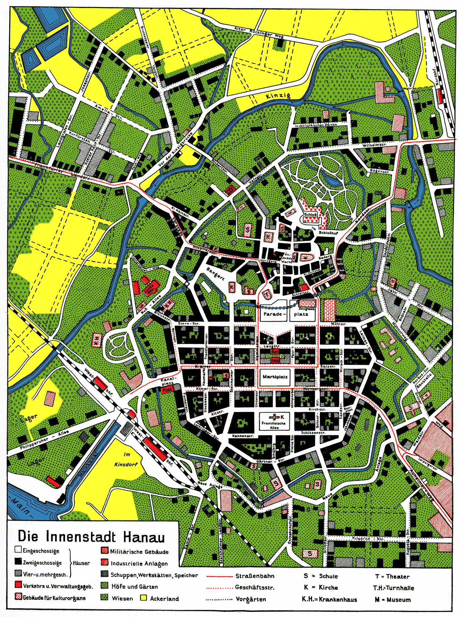 Karte der Stadt Hanau aus dem Jahre 1932